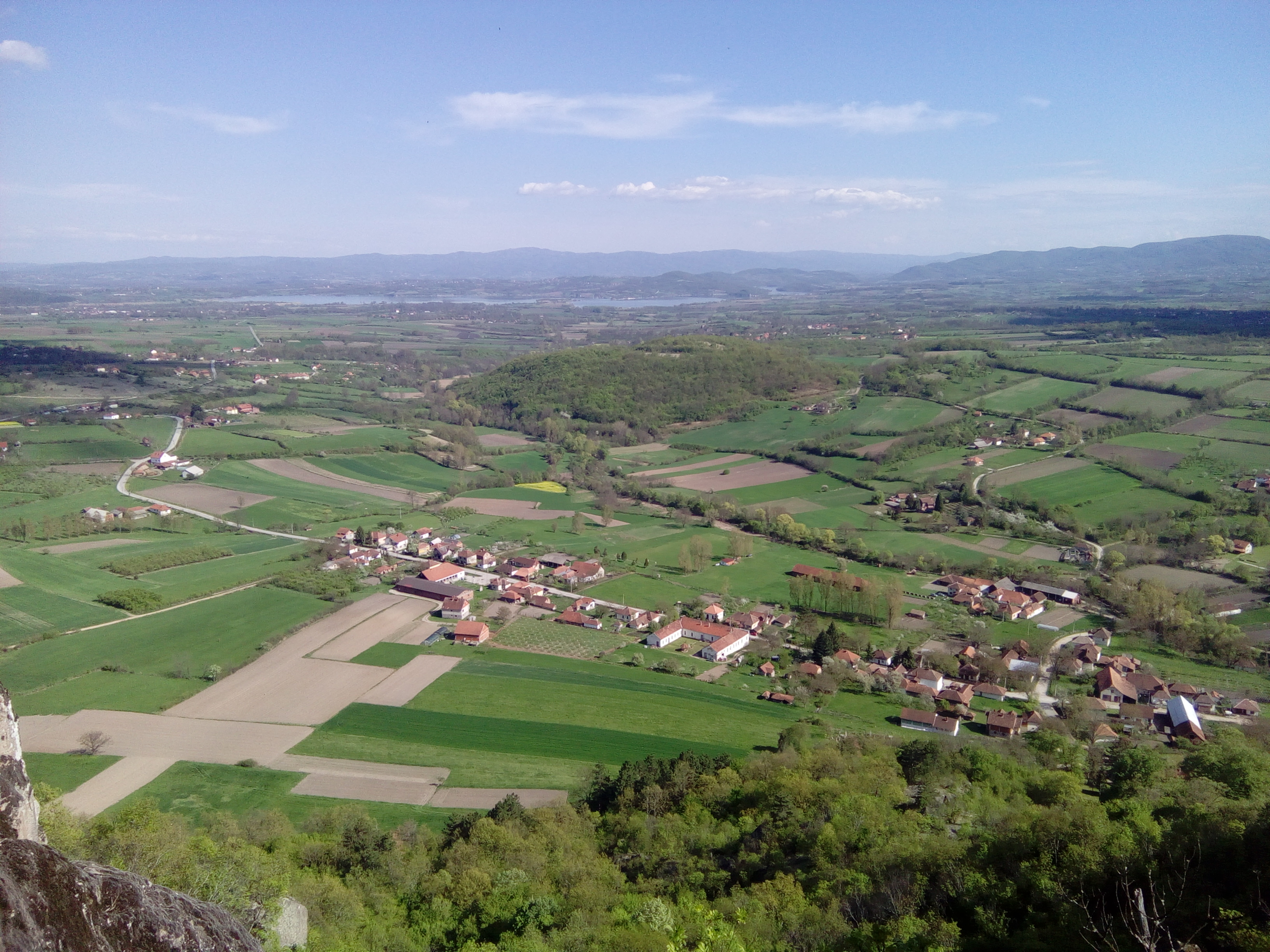 Srpski (latinica): Pogled na Borač sa Boračkog krša